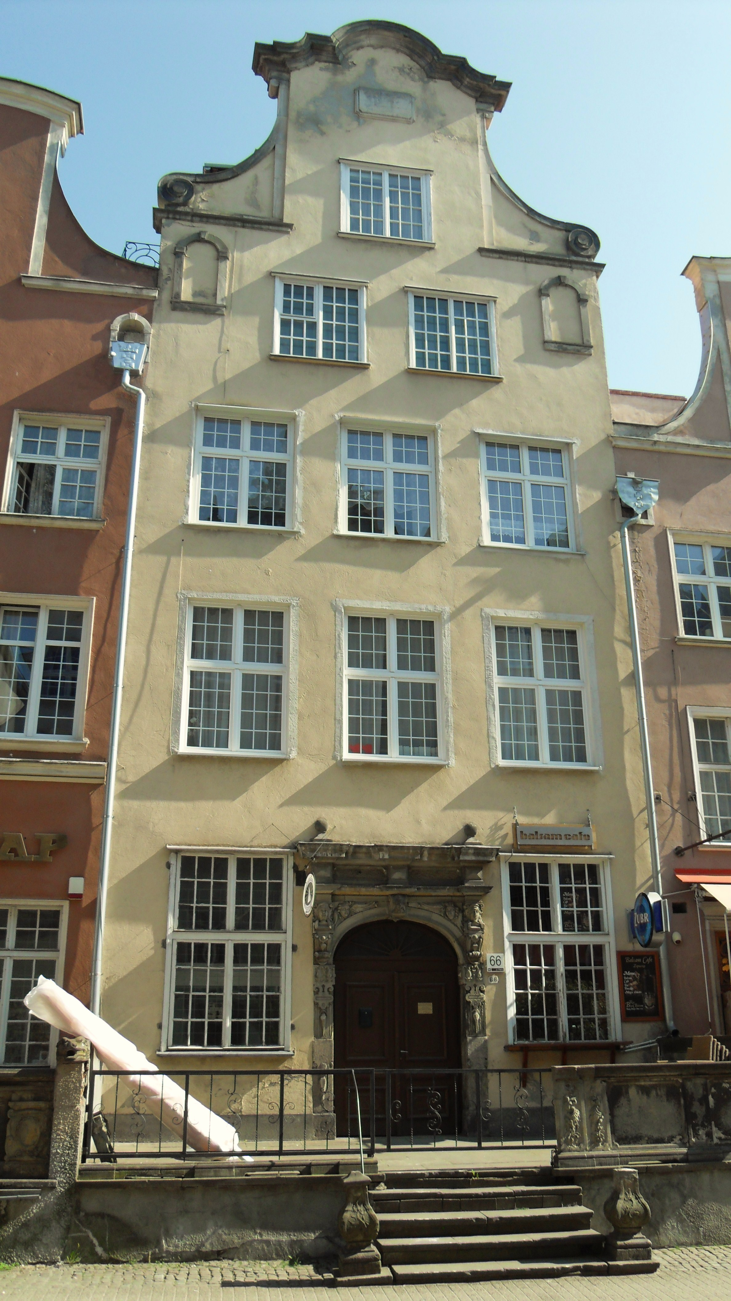 Gdańsk Główne Miasto, ul. Piwna 66.(zabytek nr rejestr. 756)